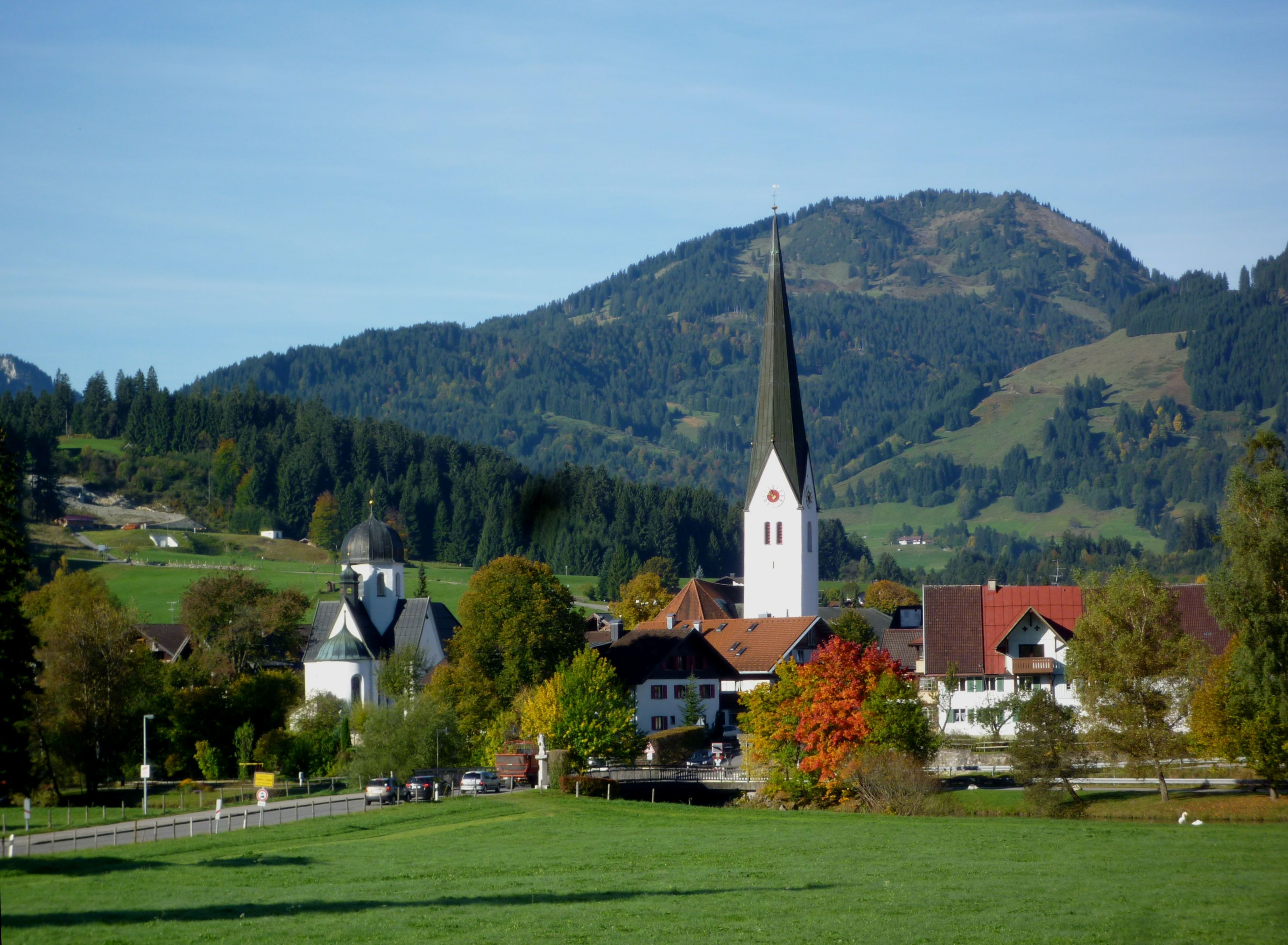 Fischen - Pfarrkirche St. Verena, Frauenkapelle